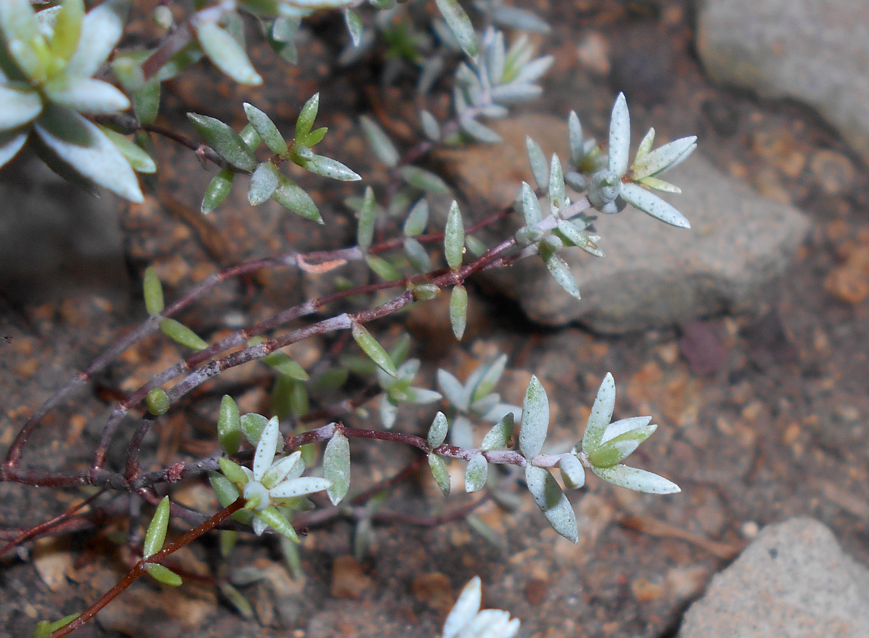 Crassula biplanata, Botanischer Garten Berlin.